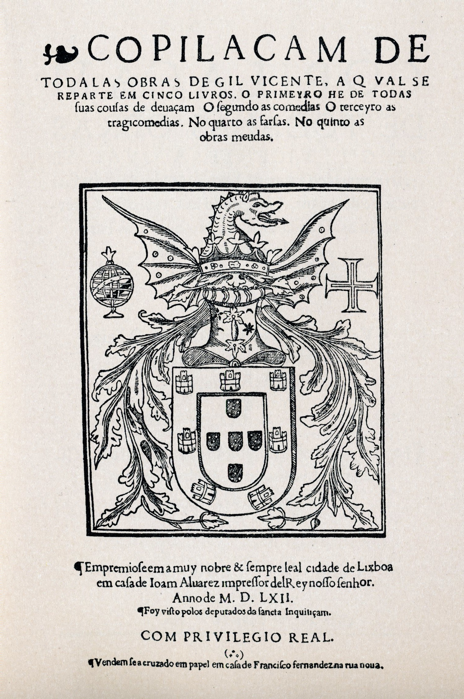 frontispice de la première édition des oeuvres complètes de Gil Vicente